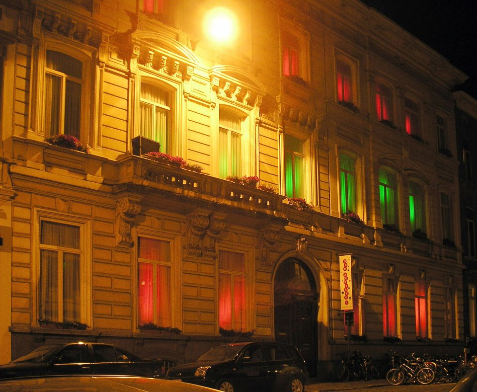 Voorgevel Amsab-ISG bij nacht, verlicht